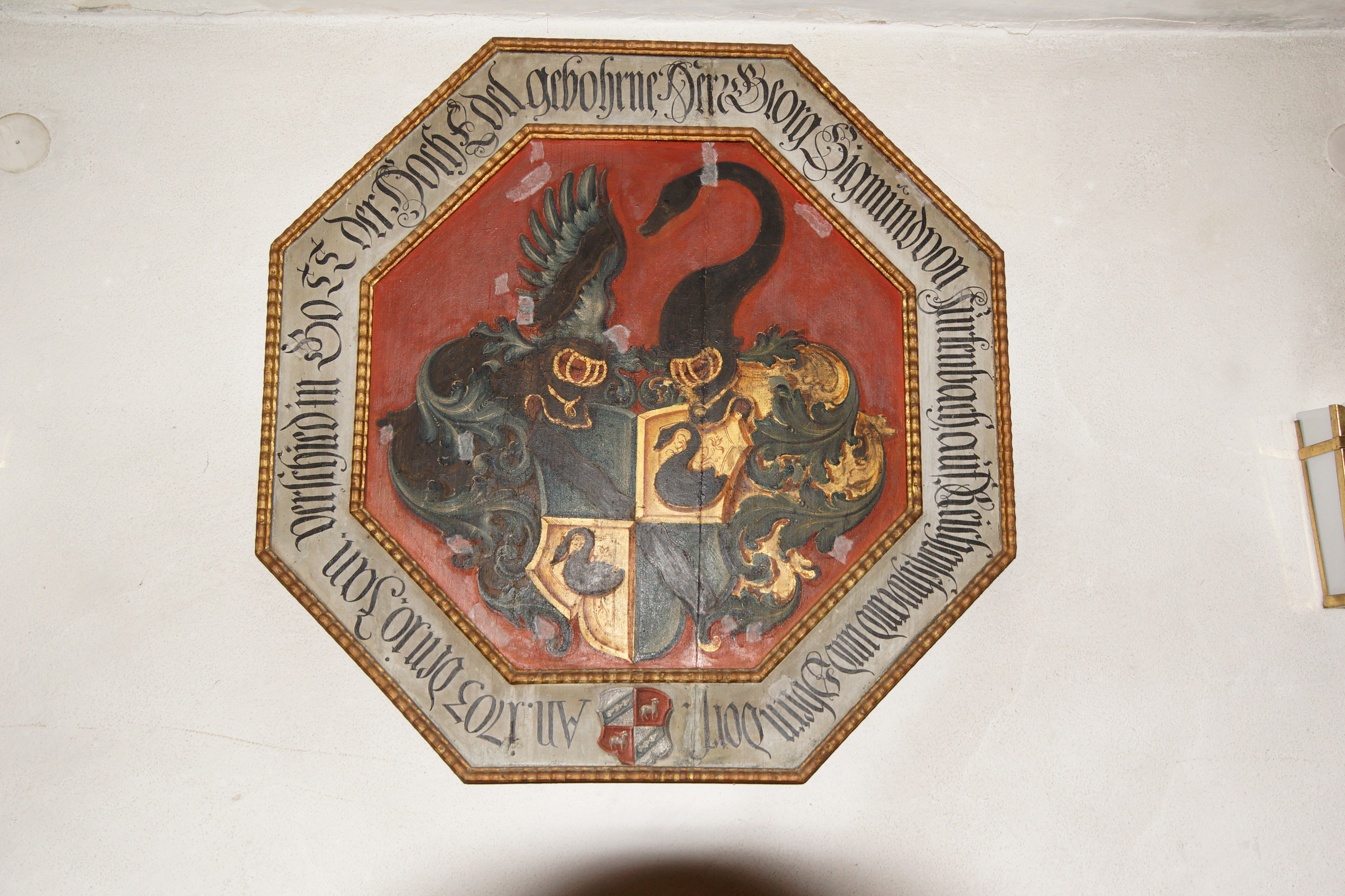 Evangelische Pfarrkirche St Afra in Reichenschwand bei Hersbruck, Totenschild für Georg Sigmund von Furtenbach (1672-1703), mit Wappen Furtenbach und Beiwappen Löffelholz von Kolberg (für die Ehefrau Sibylla Regina, geb. Löffelholz von Kolberg)